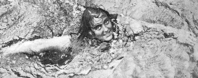 L'Australienne Miss Annette Kellermann, lors de la première traversée de Paris à la nage, en 1905.